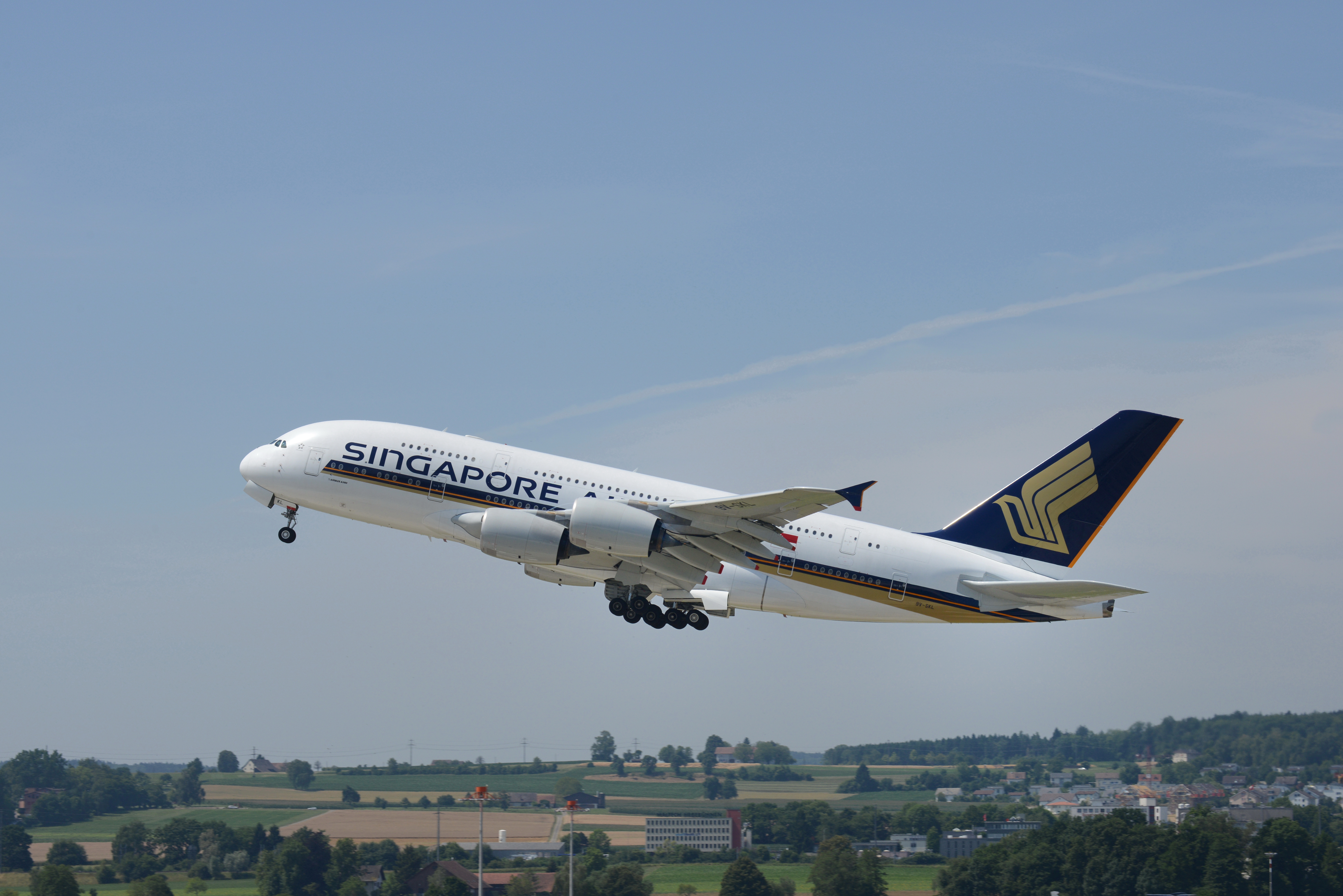 Singapore Airlines Airbus A380-841 9V-SKL@ZRH;26.07.2013.